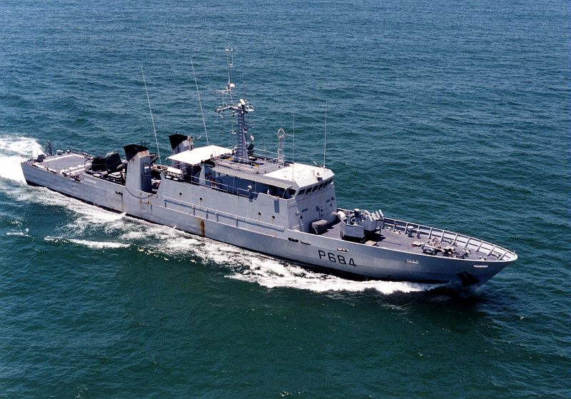 Patrouilleur P400 La Capricieuse